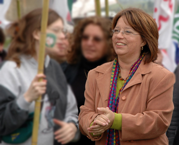 Senadora Dra. Mónica Xavier. Partido Socialista. Uruguay Author: Fernando da Rosa